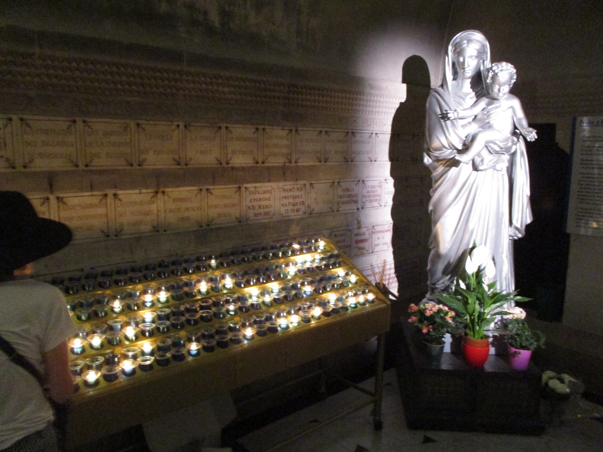 Crypt of Basilique Notre-Dame de la Garde